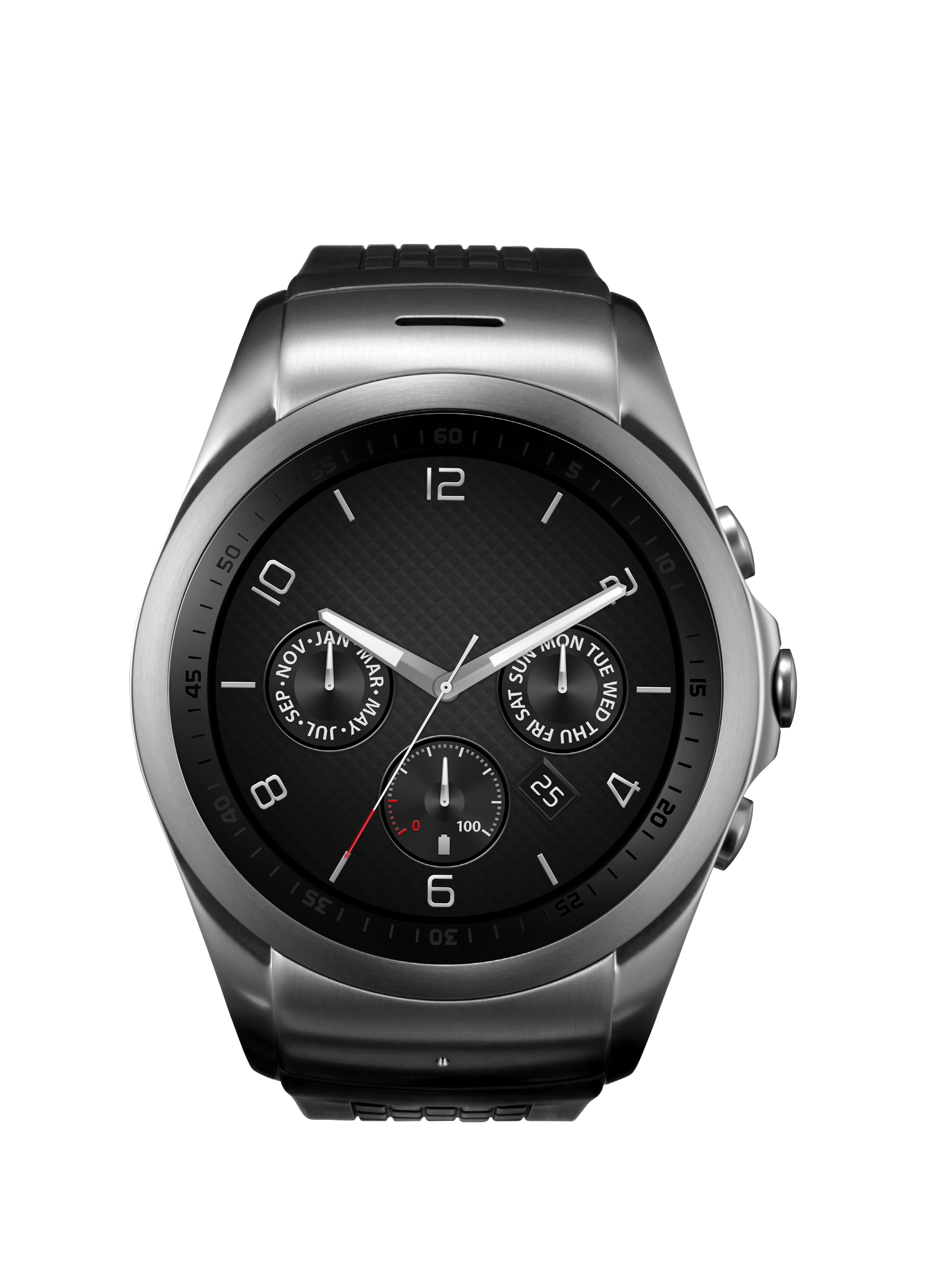 LG전자, 세계 최초 LTE 통신 가능한 스마트워치 ‘LG 워치 어베인 LTE’ 공개 ■ 세계 최초 LTE 통신 모듈 탑재해 MWC 2015서 첫 선 □ 스마트폰 없이도 VoLTE(LTE기반 음성통화), 빠른 데이터 송·수신 □ 다자간 동시 대화하는 ‘LTE 무전기’ 기능 □ 위급상황에서 버튼 하나로 통화 연결되는 ‘안전지킴이’ 기능 ■ 한층 진화한 스마트워치 UX(사용자 경험) □ 스마트워치에 세계 최초로 NFC기반 월렛 탑재해 간편 전자 결제 □ 음성인식 통한 외국어 번역 기능 □ 야외 레포츠 활동 시 지형·위치·방향정보, 개인 심박수 정보 제공 ■ 세계 최대 대용량 배터리 장착 □ 전작 대비 약 1.7배 늘어난 700mAh 대용량 배터리 ■ 사용 편의성 높인 디자인 채택 □ 메탈 바디 측면에 3개의 물리 키(용두) 적용… 한 번만 누르면 각각의 특수기능(설정화면가기, 화면전환, 뒤로가기 등) 빠르게 실행 ※ Social LG전자 ( 에서 관련 보도자료를 확인하실 수 있습니다.